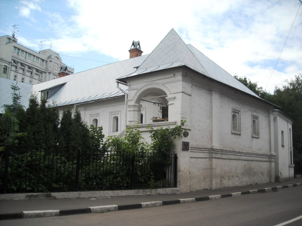 Spiridonovka to Церковь Вознесения Господня в Сторожах, у Никитских ворот («Большое Вознесение»)